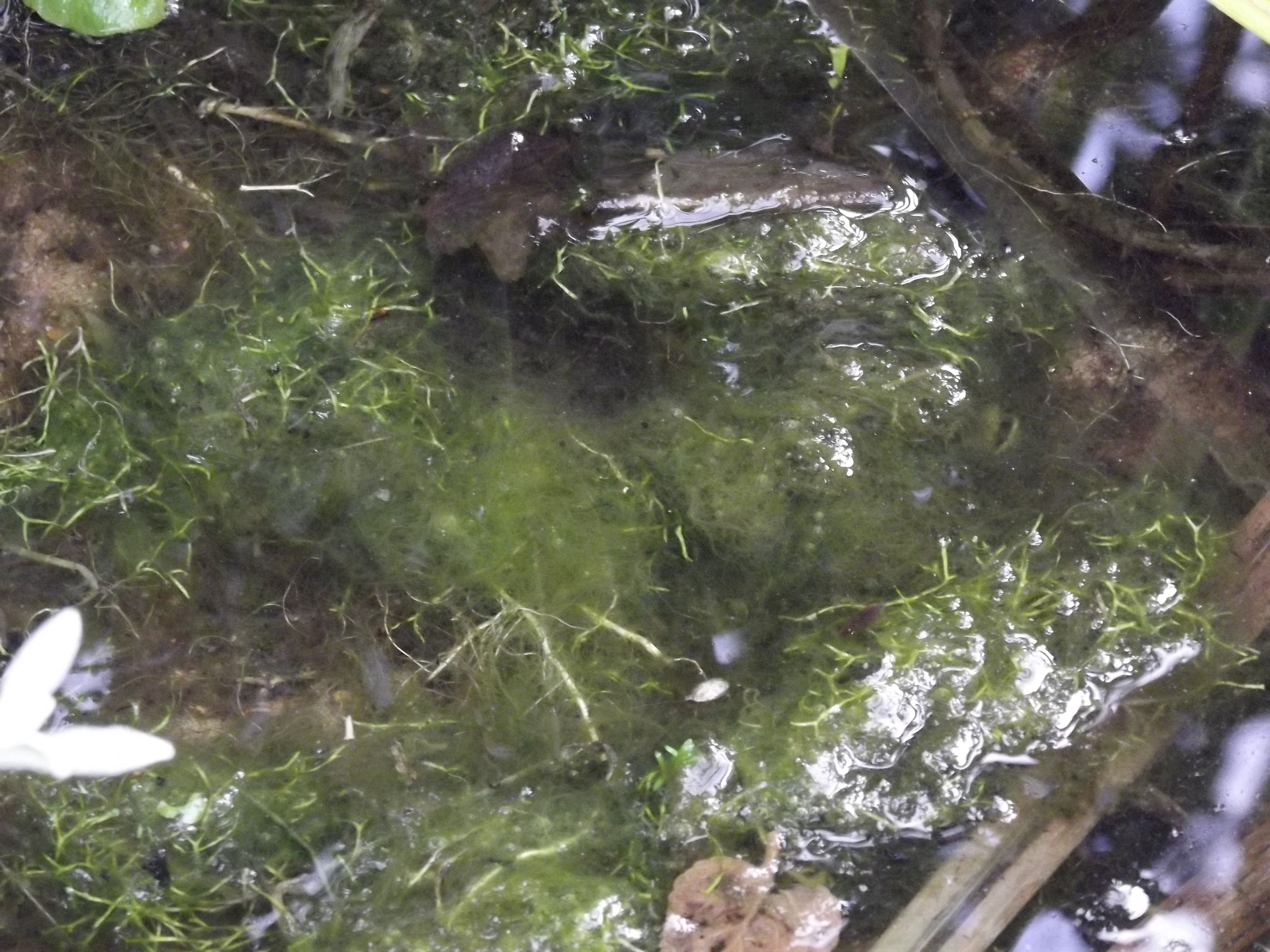 Glony na bagienku w oczku wodnym